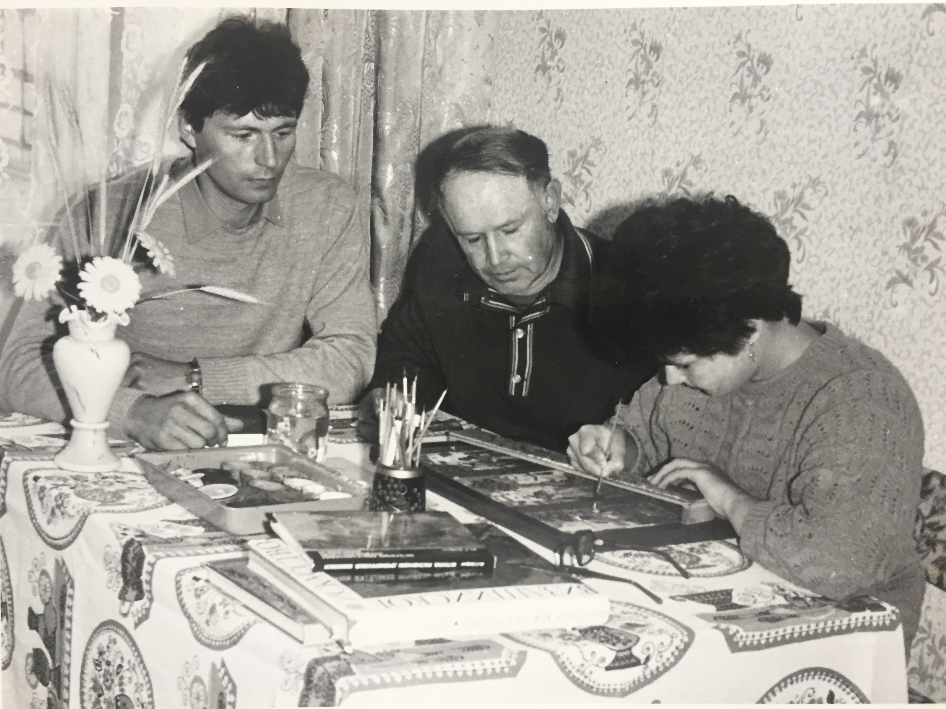 Сосин Петр Ильич с родными